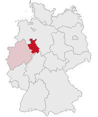 Regierungsbezirk Detmold, North Rhine-Westphalia, Germany